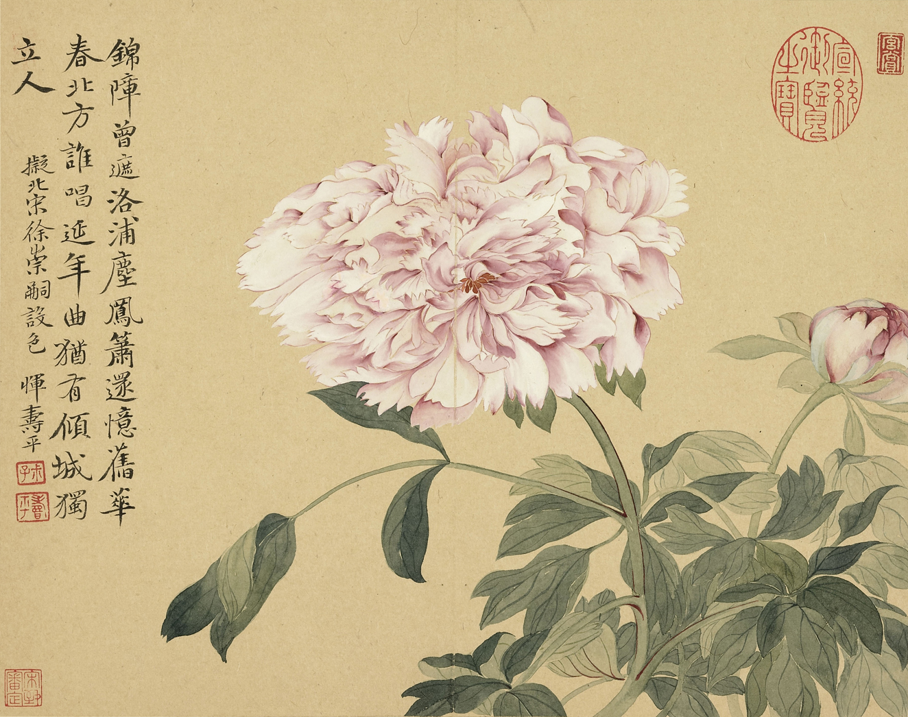 選自「摹古冊」